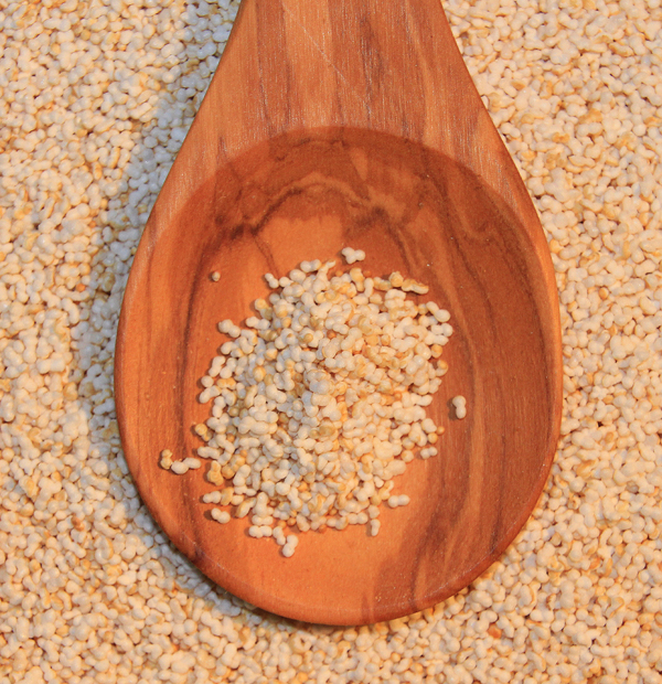 Amaranth gepufft